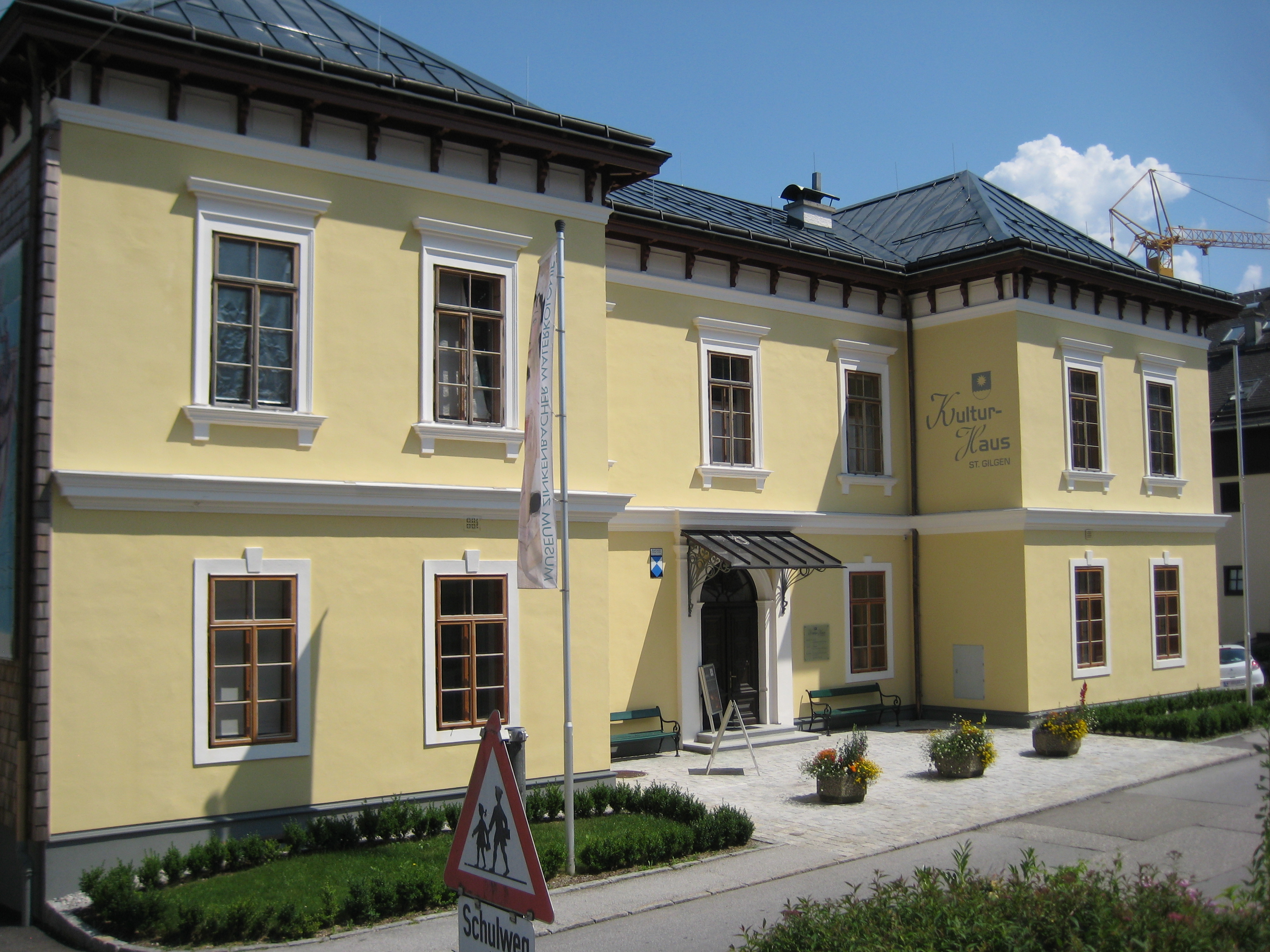 Volksschule